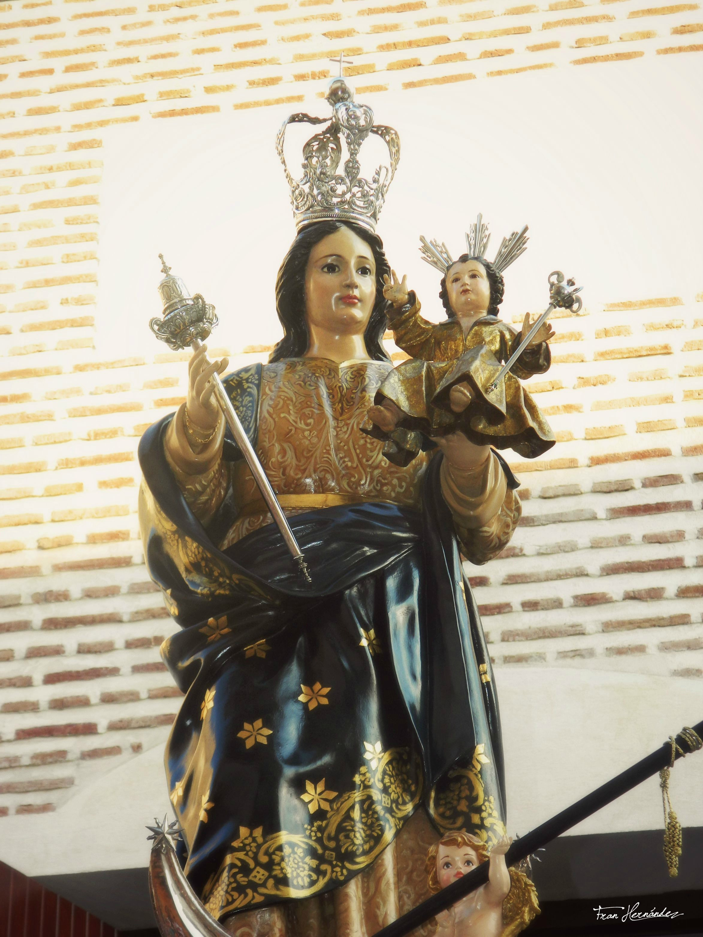 Imagen de la Virgen del Mar, Patrona y Alcaldesa Perpetua de la Ciudad de Adra (Almería)